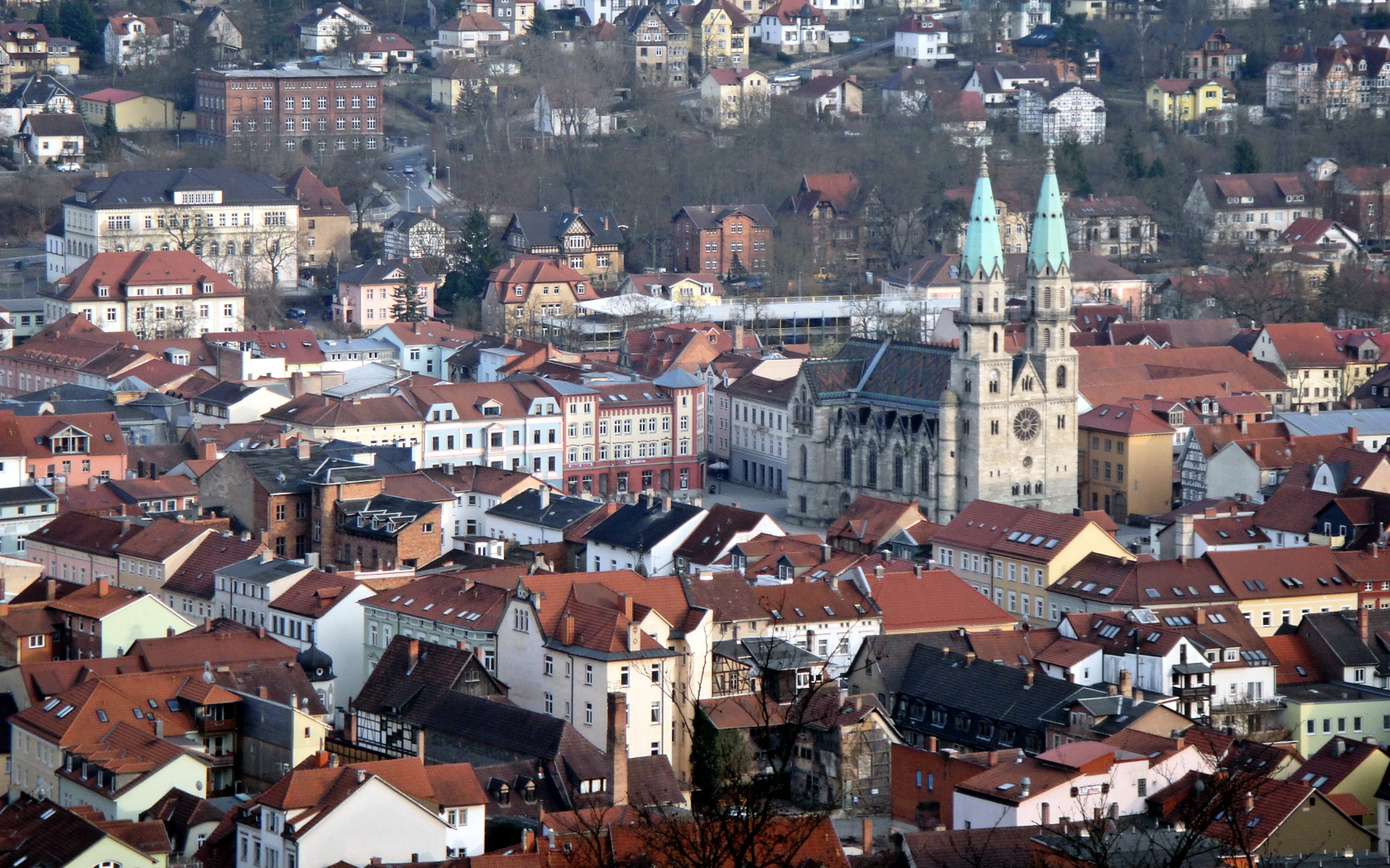 Blick von oben (aus dem Wald) auf den Meininger Marktplatz